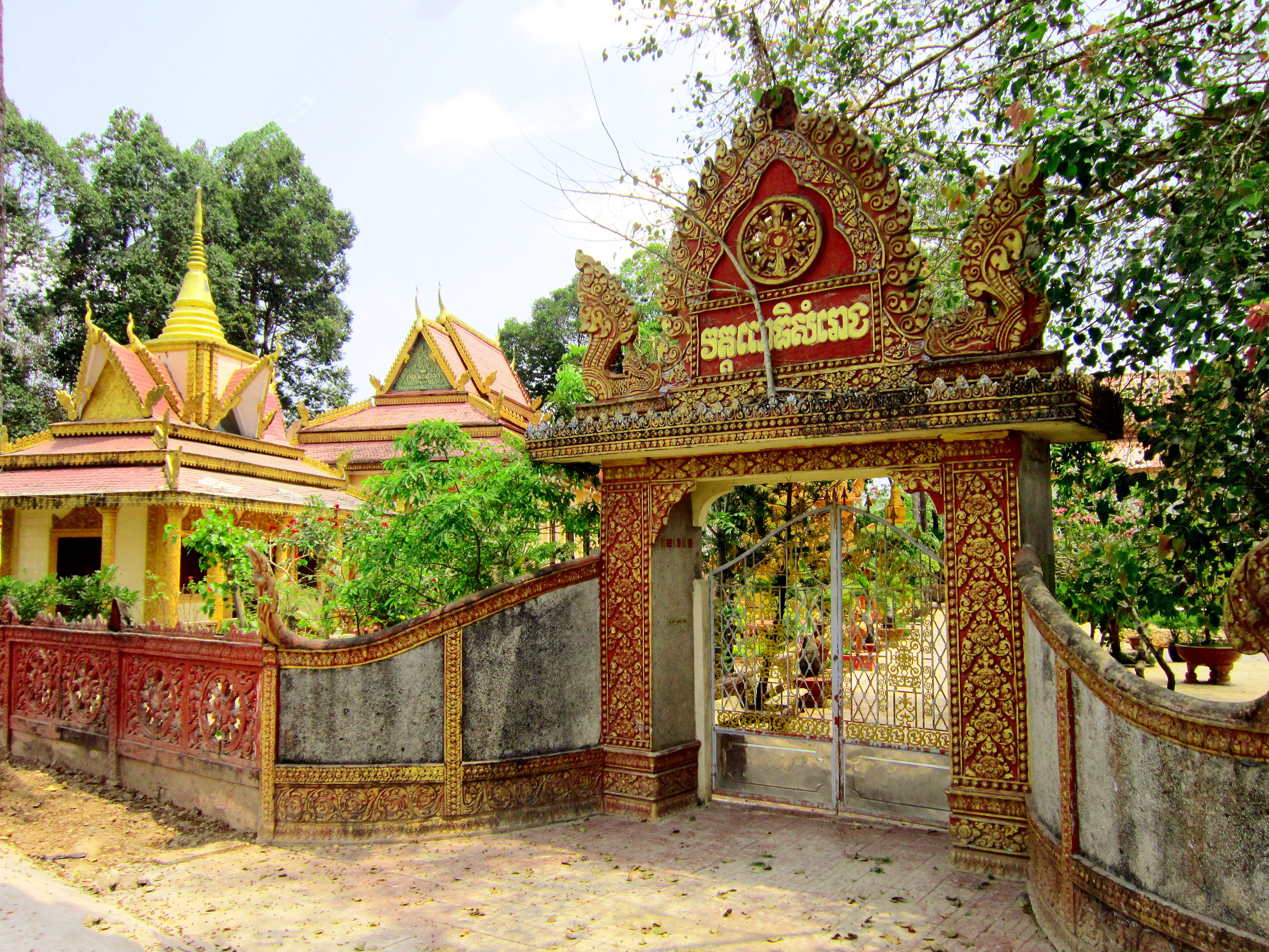 Chùa Pôthi Somrôn là một ngôi chùa Khmer cổ tọa lạc cạnh vàm sông Ô Môn, thuộc phường Châu Văn Liêm, quận Ô Môn, thành phố Cần Thơ, Việt Nam.